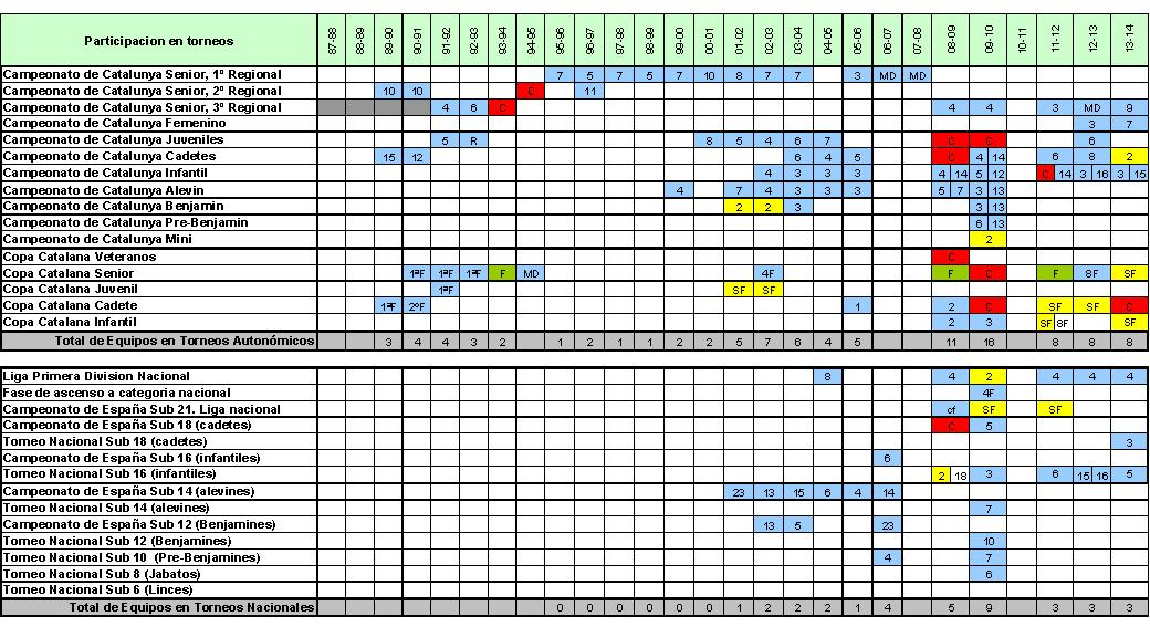 Torneos Catalanes y Españoles disputados 1994-2014